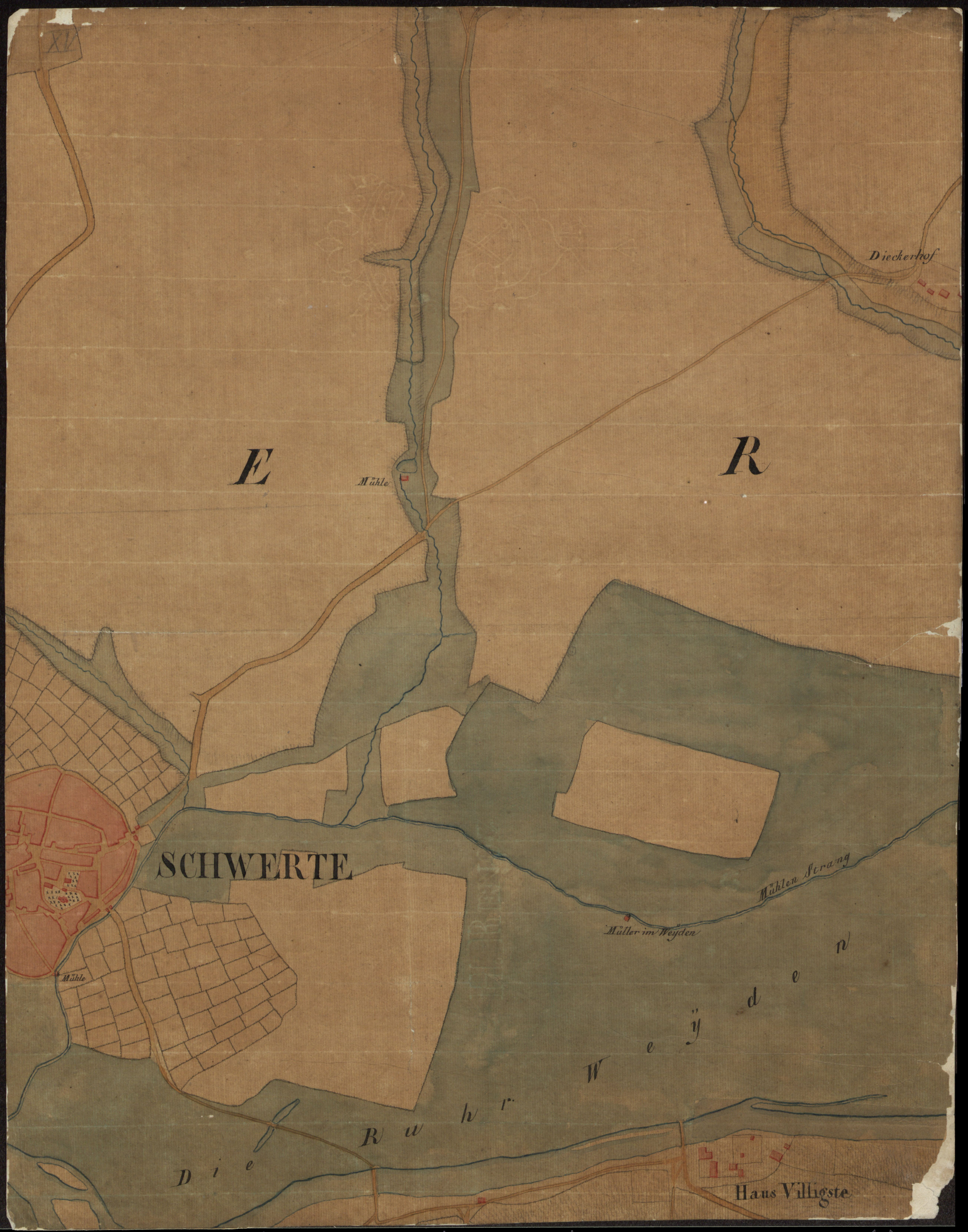 Spezialkarte des östlichen Distrikts Hörde Nachdruck als „Carte speciale des mines“.